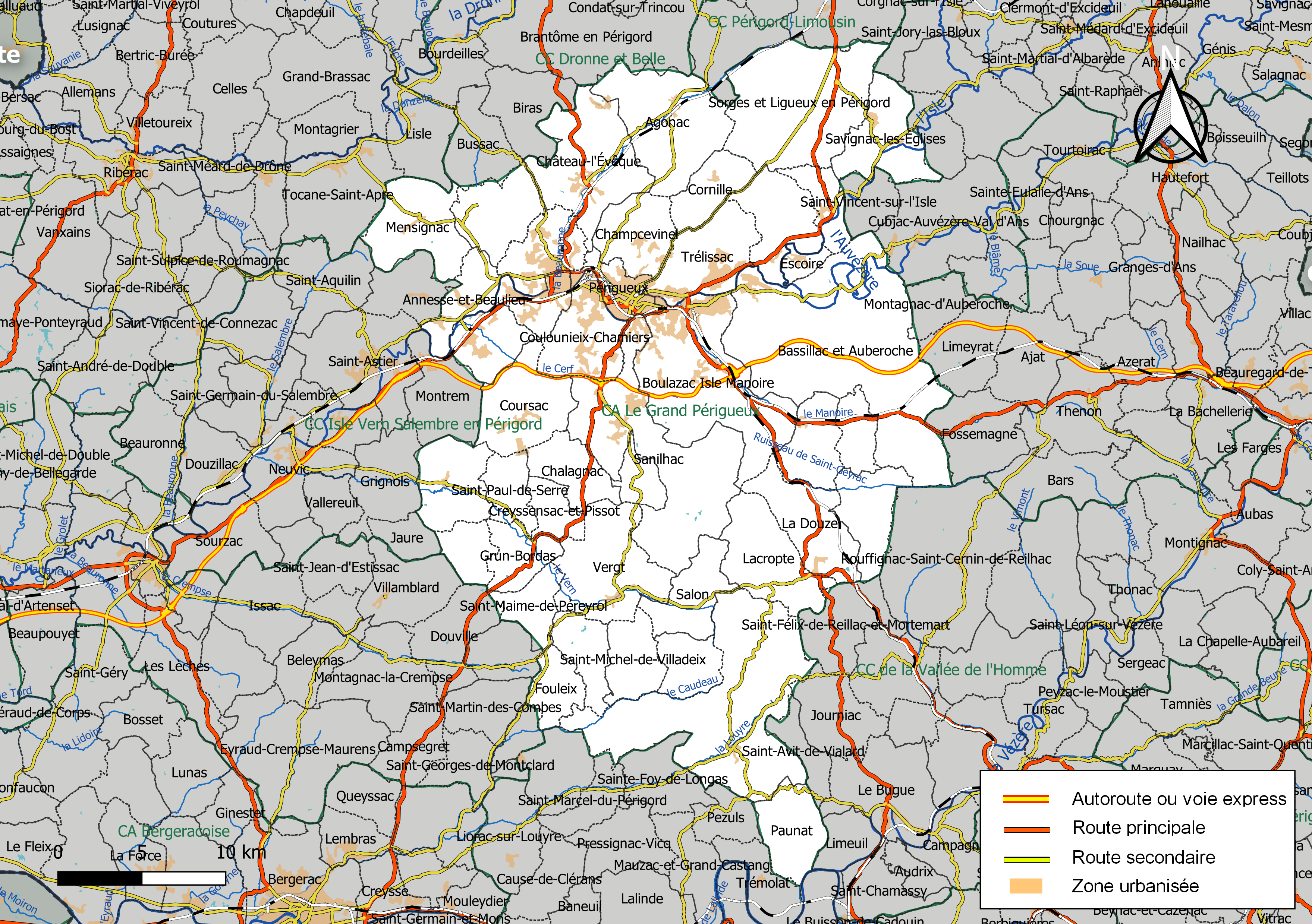 Carte géographique de la Communauté d'agglomération Le Grand Périgueux, département de la Dordogne, France. Composition au 1er janvier 2019.